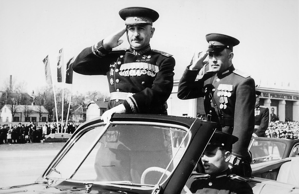 Рига. Командующий Прибалтийским военным округом Герой Советского Союза генерал армии Иван Христофорович Баграмян принимает парад в честь 36-й годовщины Октябрьской революции